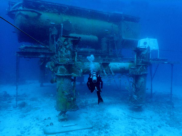 NOAA AquaLab Aquarius